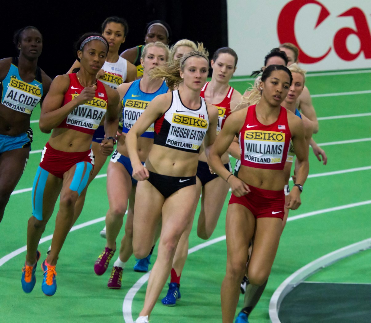 266 800m meerkamp